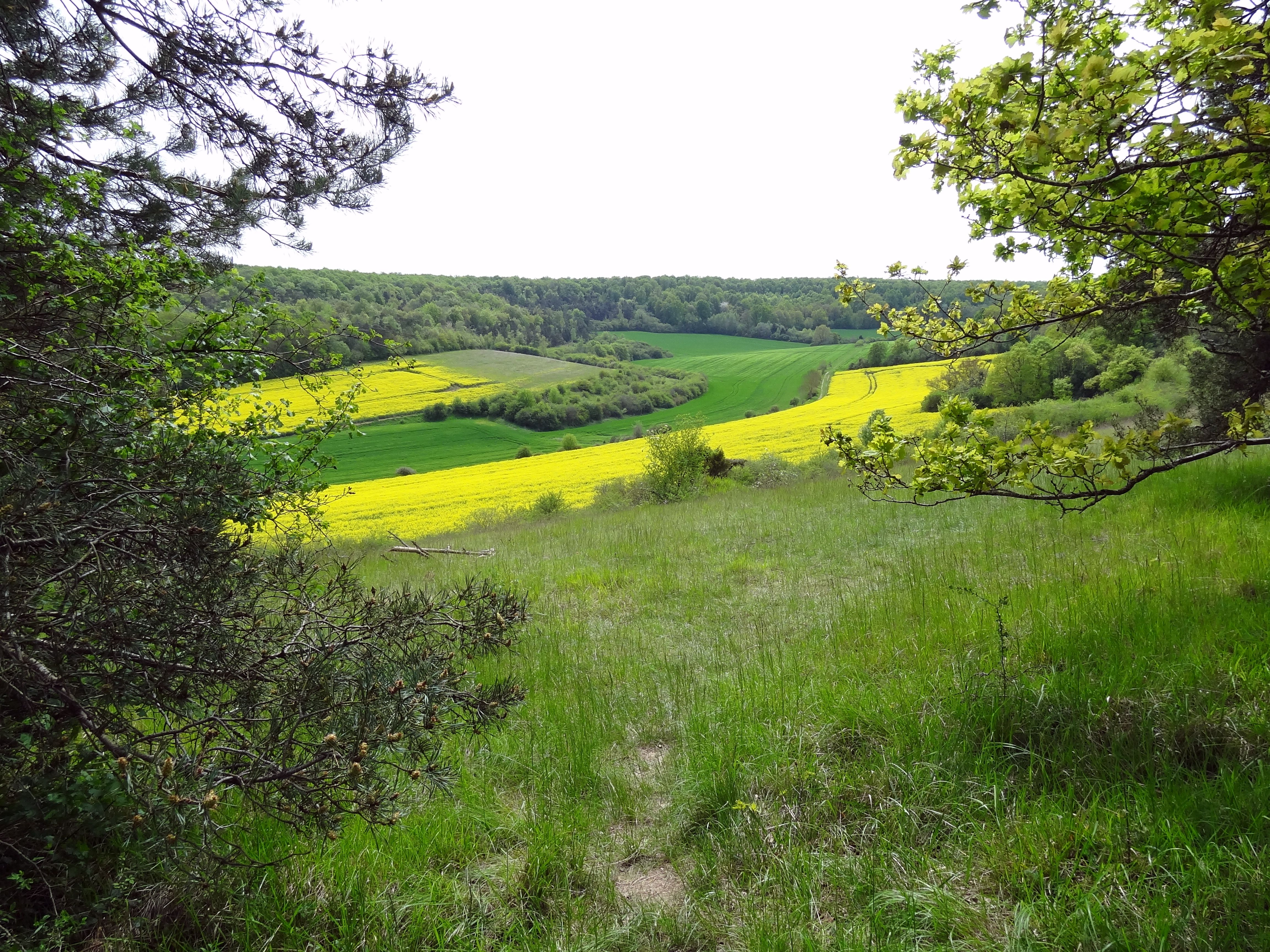 Réserve naturelle régionale de la vallée des Cailles